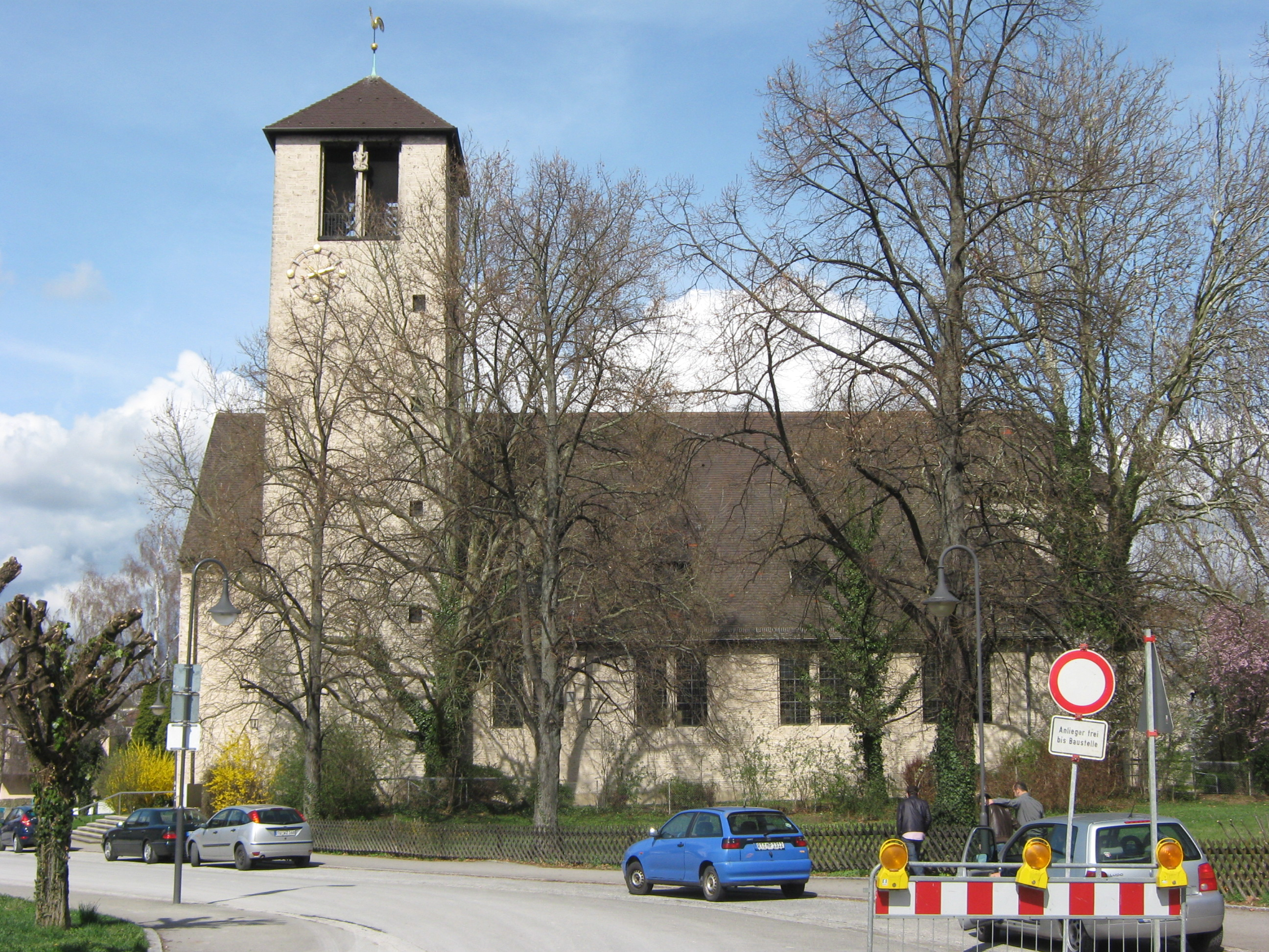 Vor der Christuskirche in Reutlingen stehen zwei Platanen, die unter der Schutzgebiets-Nr. 84150610203 als Naturdenkmal eingetragen sind. Schutzgebietssteckbrief der LUBW